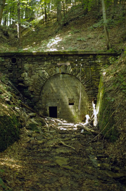 Östliches Tunnelportal der Waldbahn Deutschlandsberg - Freiland; Steiermark; Österreich. Tunnel ist 306 Meter lang, auf dem Tunnelschild steht 311 Meter ( Seite 13)